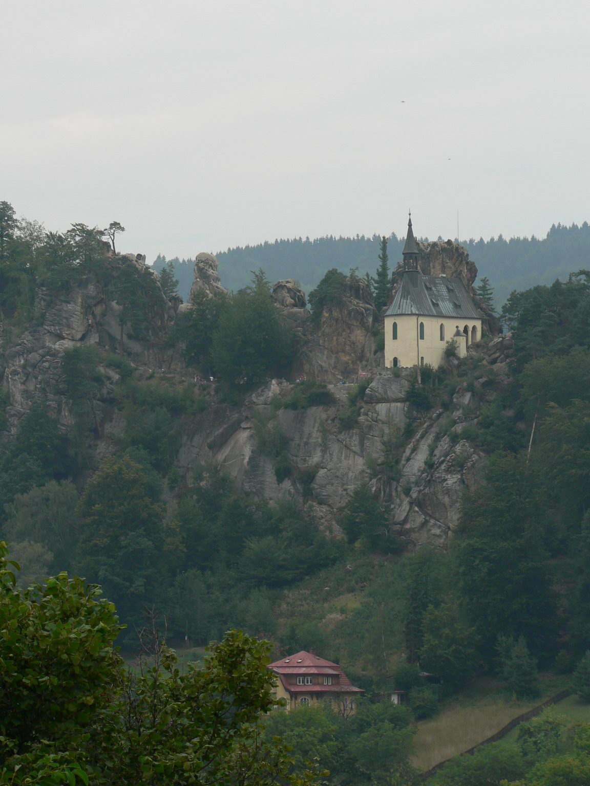 Pantheon.